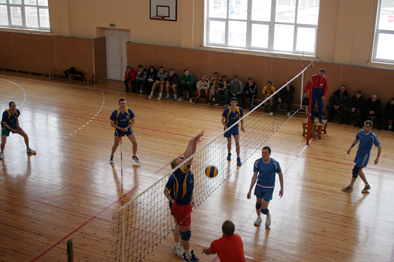 Соревнования по волейболу на базе Олимпа